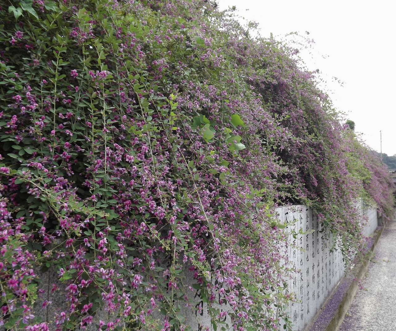 萩原寺ではハギが咲き乱れる